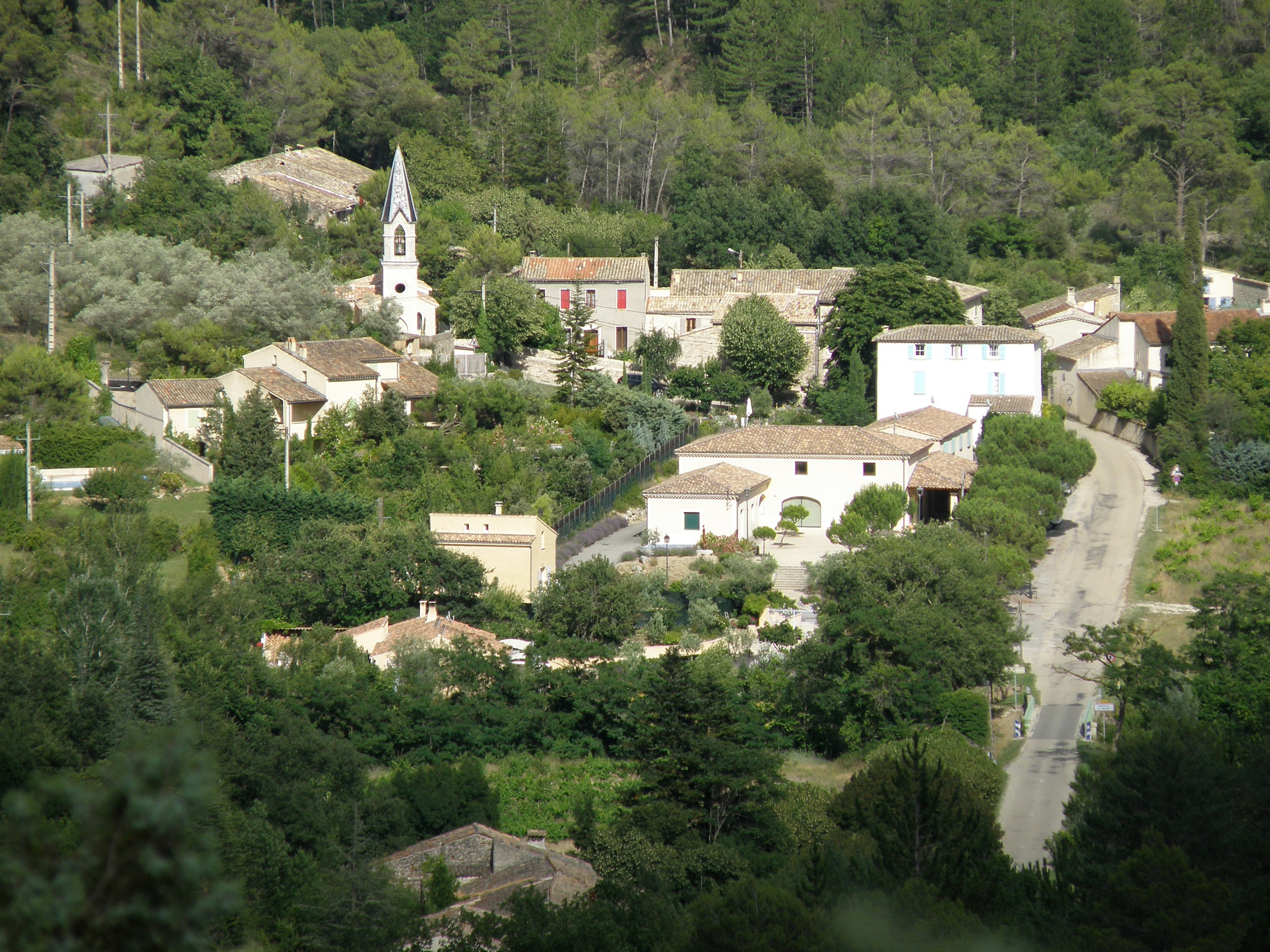 Propiac (Drôme, France). Vue générale, prise depuis la departementale D147, à l'ouest du village (nous regardons donc vers l'est).